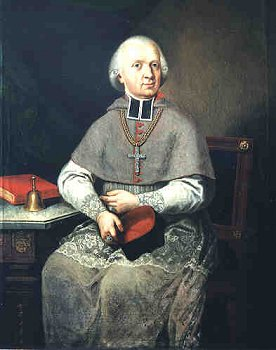 brněnský biskup Vincenc Josef kníže Schrattenbach